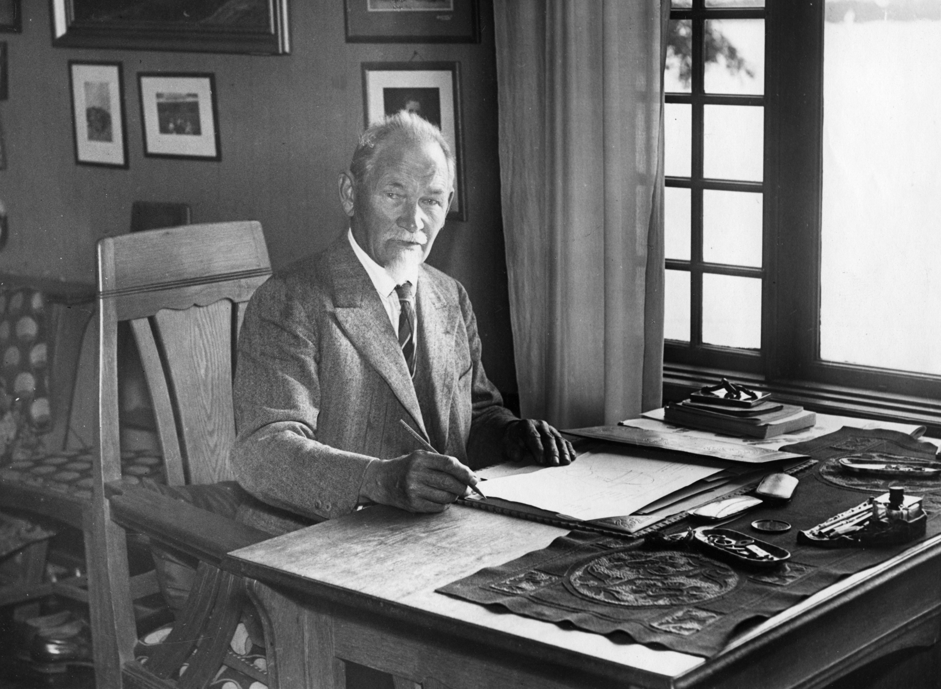 Fabrikör C. R. Nyberg vid skrivbordet på Täcka Udden.